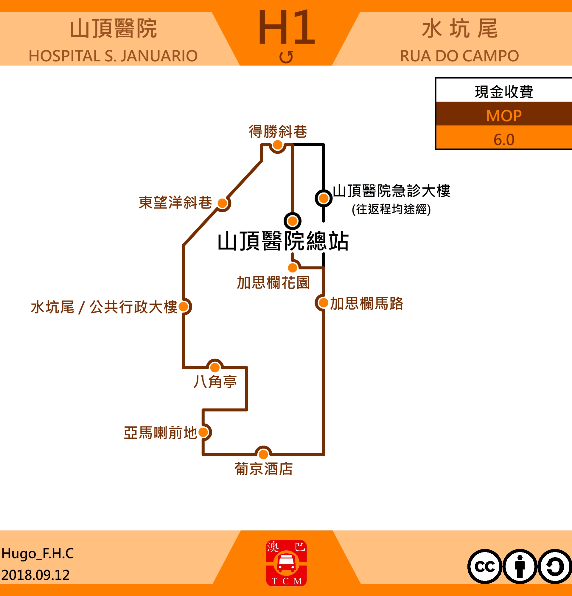 澳門巴士H1走線圖